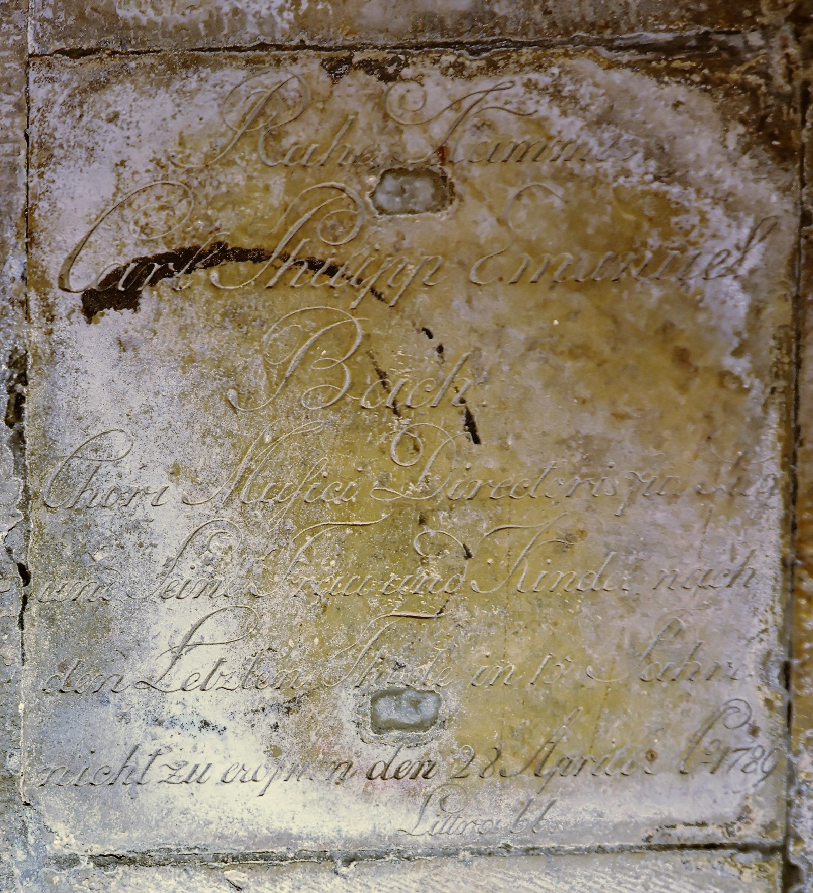 Grabplatte von Carl Philipp Emanuel Bach (verstorben 14. Dezember 1788) in der Krypta des Hamburger Michel Inschrift: Ruhe Kammer Carl Philipp Emanuel Bach, Chori Musici Directoris für Sieg [sich] und Seine Frau und Kinder nach Den Letzten Thode in 15 Jahre nicht zu eröfnen, den 28. Aprill A[nn]o 1789, Littra bb, I".